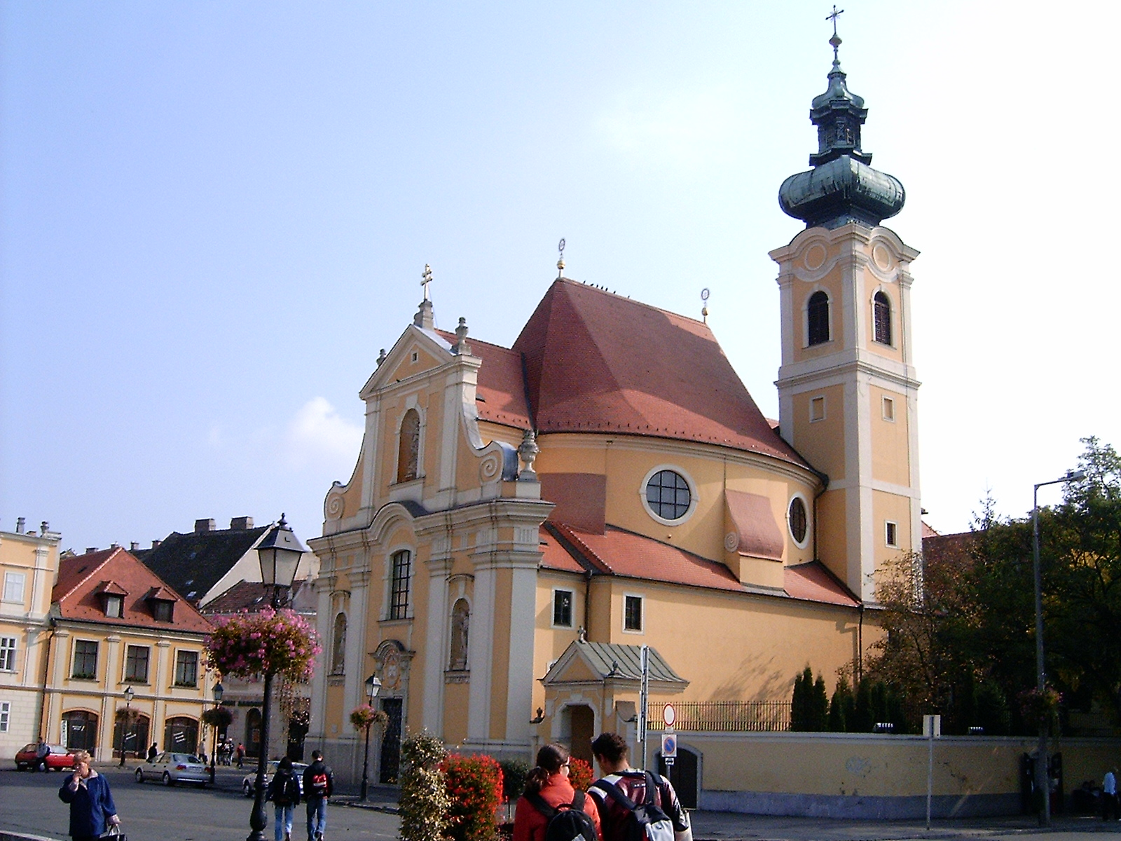 A győri Karmelita templom (Győr-Moson-Sopron megye)